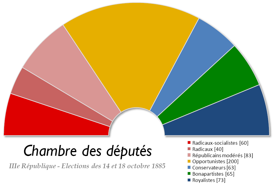 Chambre des députés française issue des élections législatives de 1885